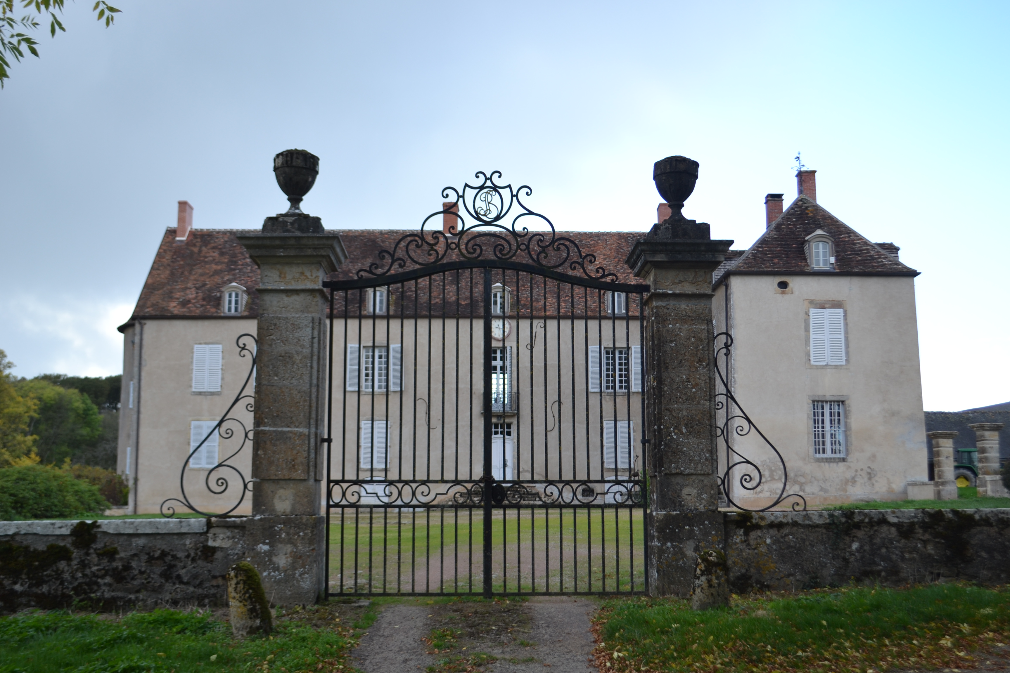 Château de Quincize, Blismes (Nièvre).